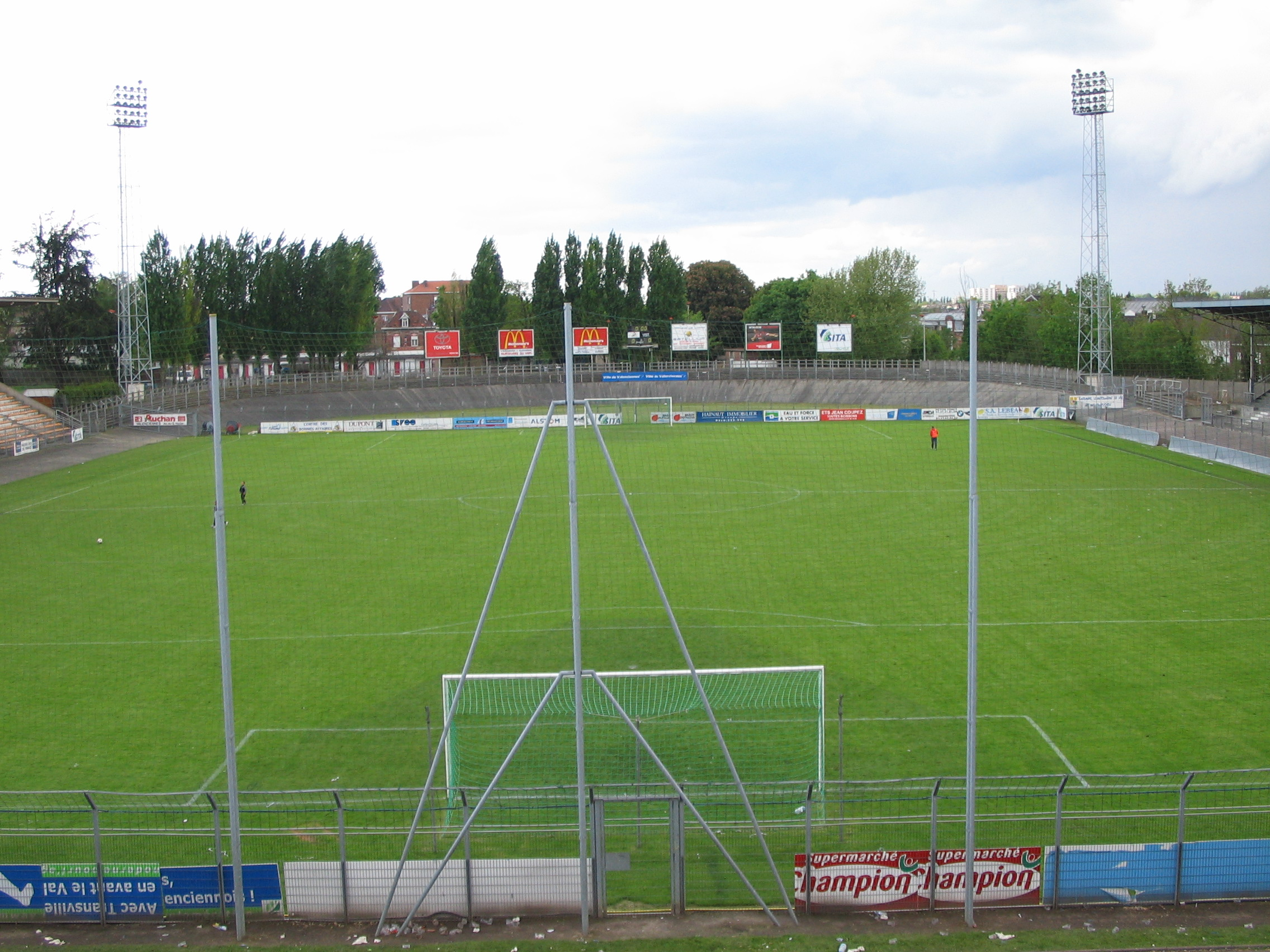 Vue depuis la tribune Pouille. En face, l'ancien virage ouest.